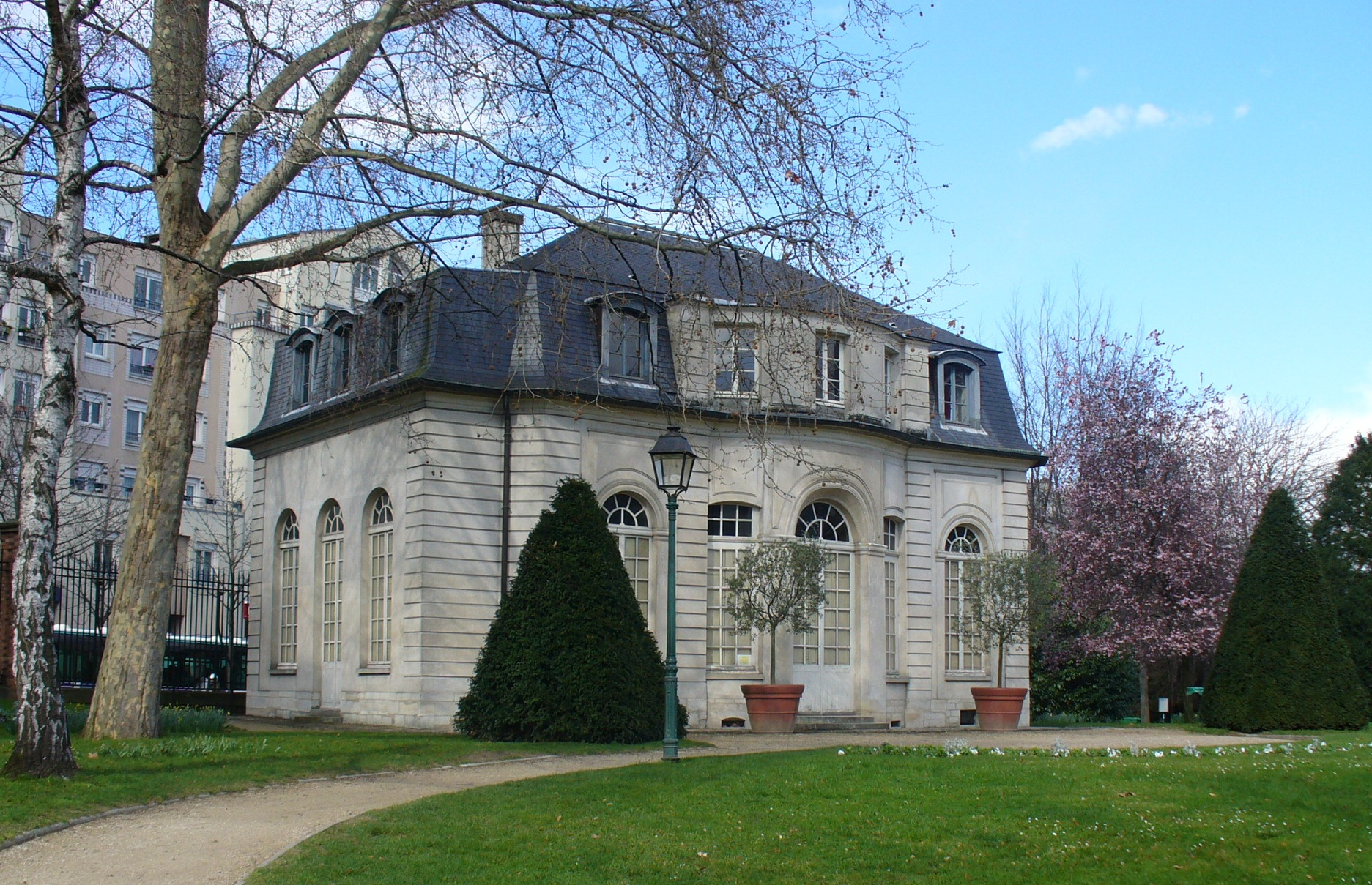 Pavillon de l'Ermitage (ancien château de Bagnolet)